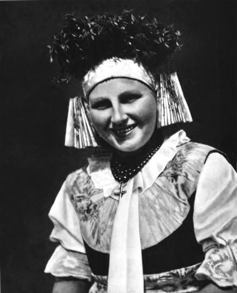 Ein Roßberger Mädchen in Tracht, vermutlich als Brautjungfer.